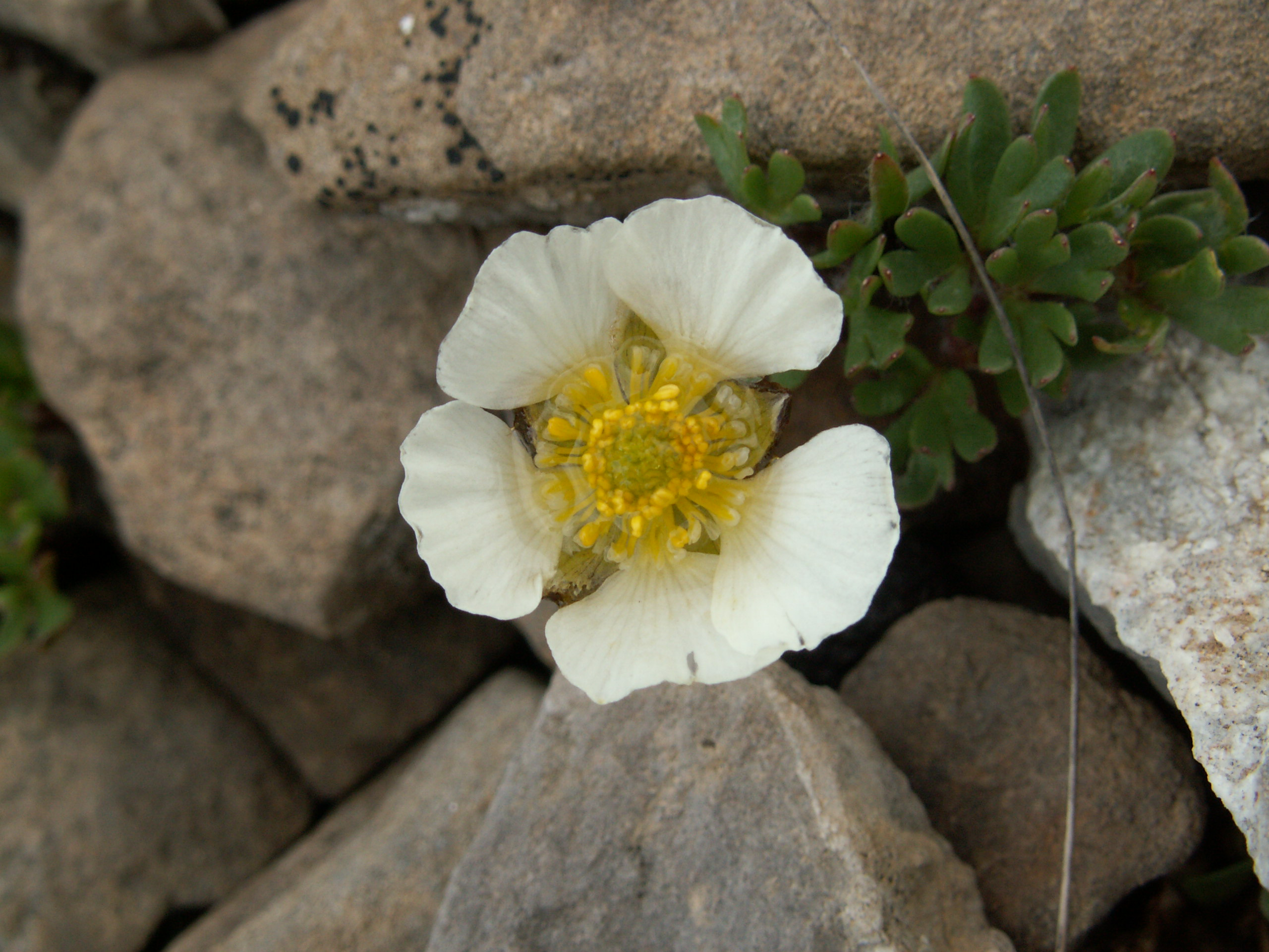 Ranunculus glacialis, Schynige Platte, Kanton Bern, Schweiz